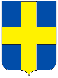 Stemma di Verona, Italia.